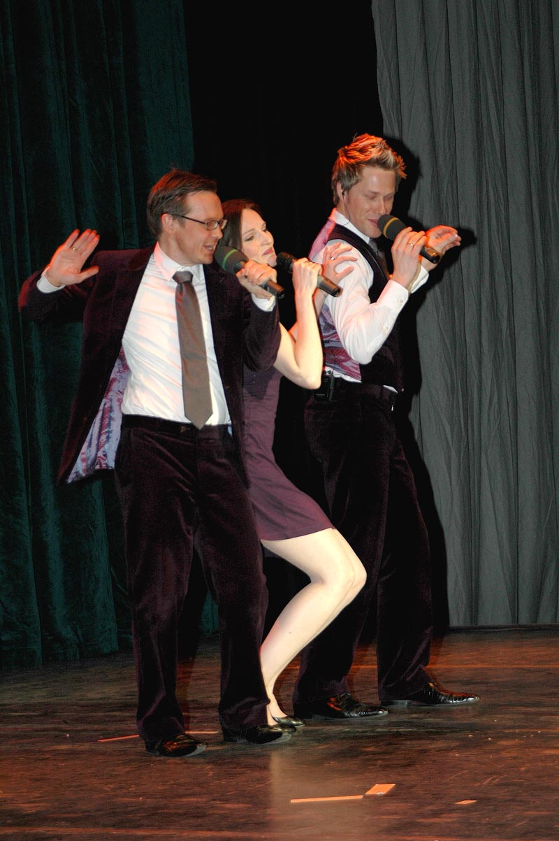 Die Acapella-Truppe: LaLeLu auf der Freiburger Kulturbörse 2009